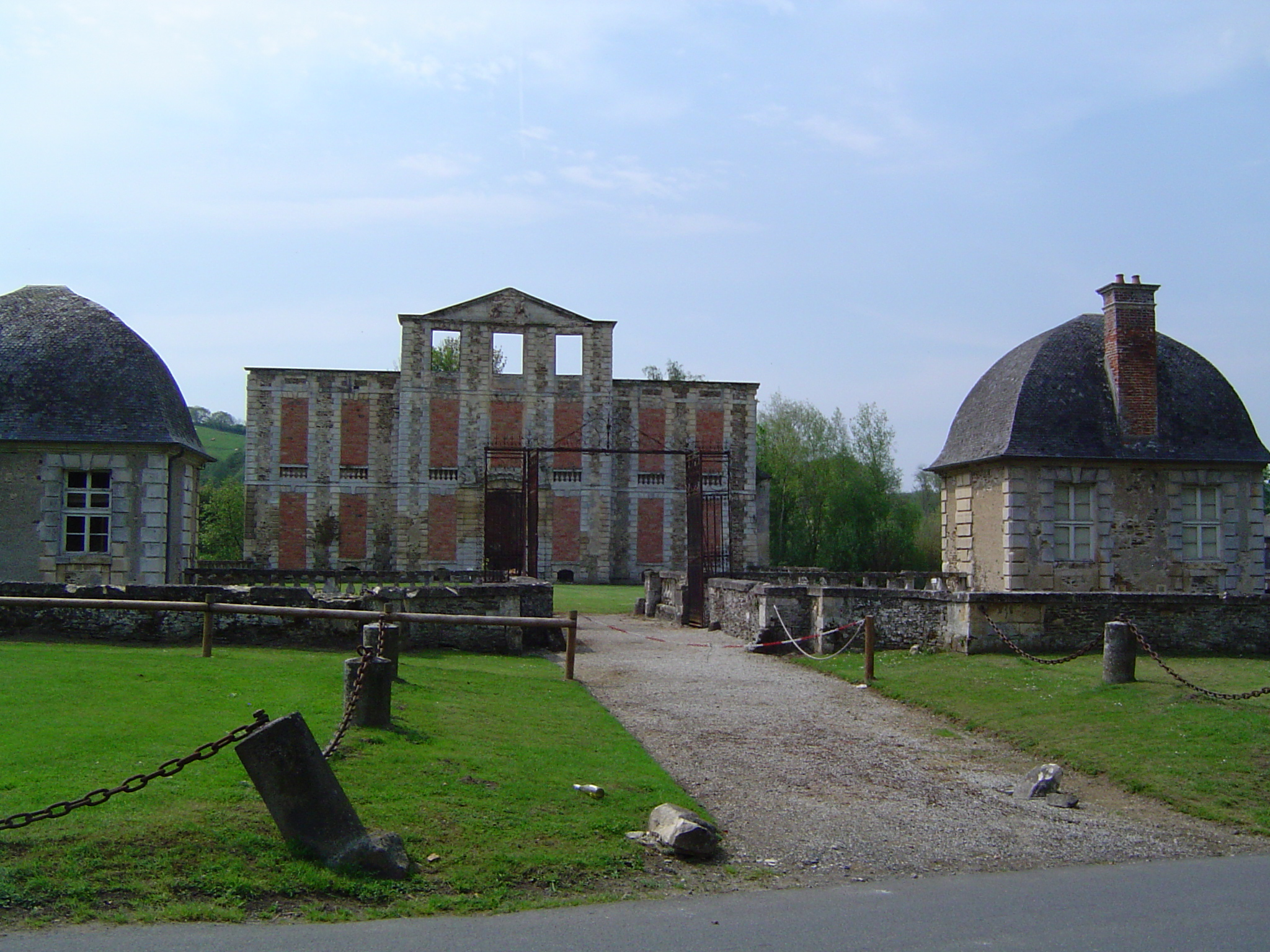 Façade du château de Thury-Harcourt dans le Calvados en France. 2005. Cevenol2